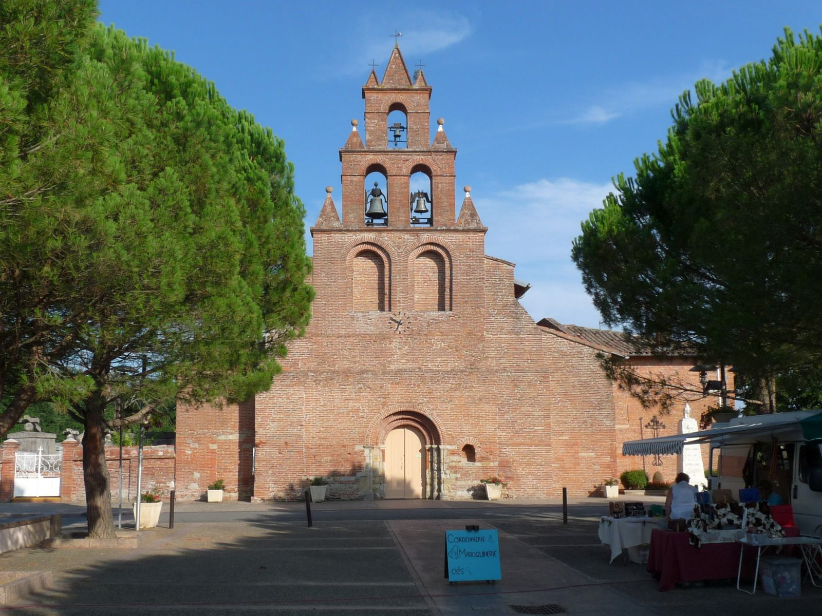 Eglise de Drémil-Lafage, Haute-Garonne, France